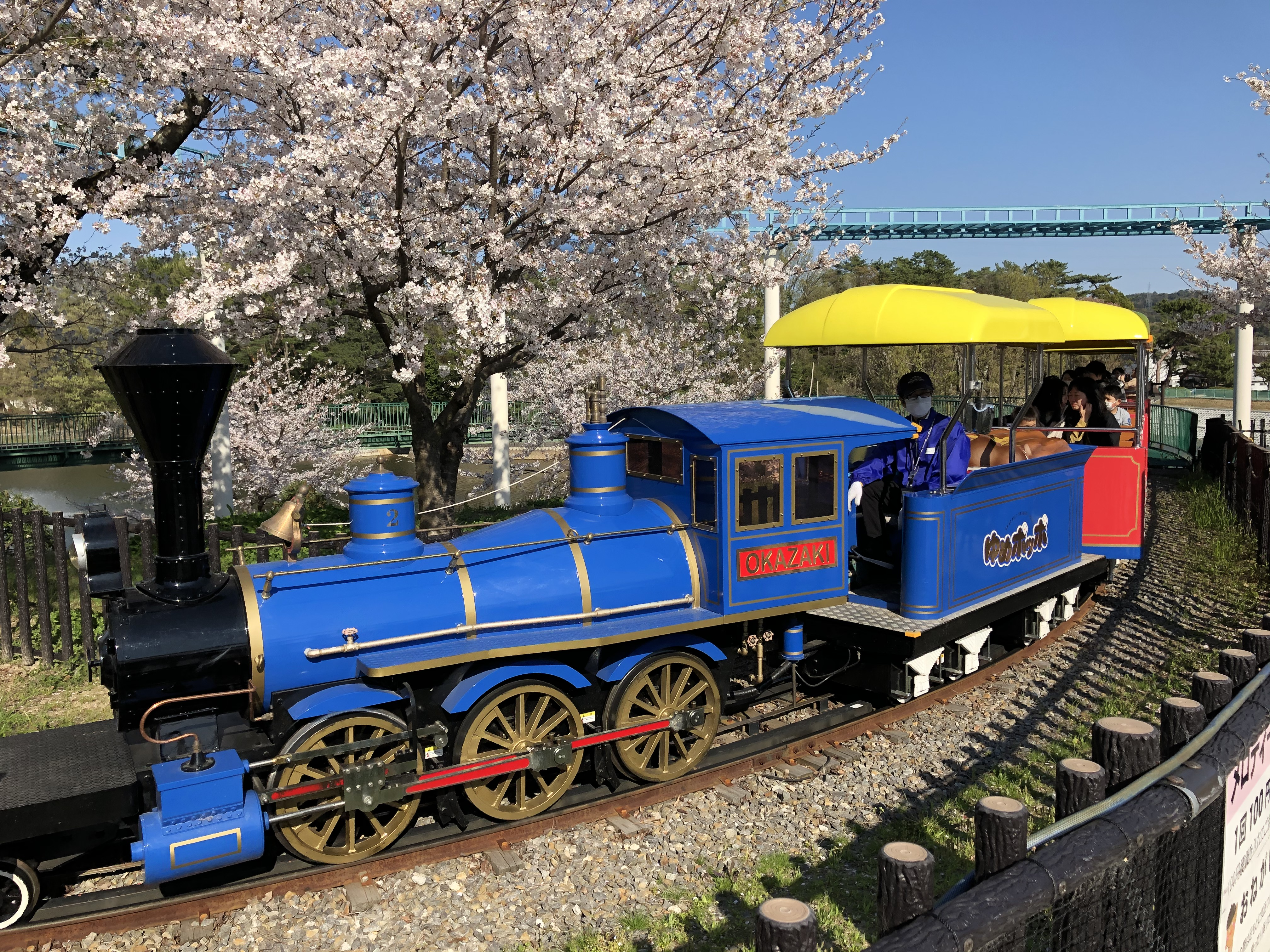 南公園（岡崎市若松町）